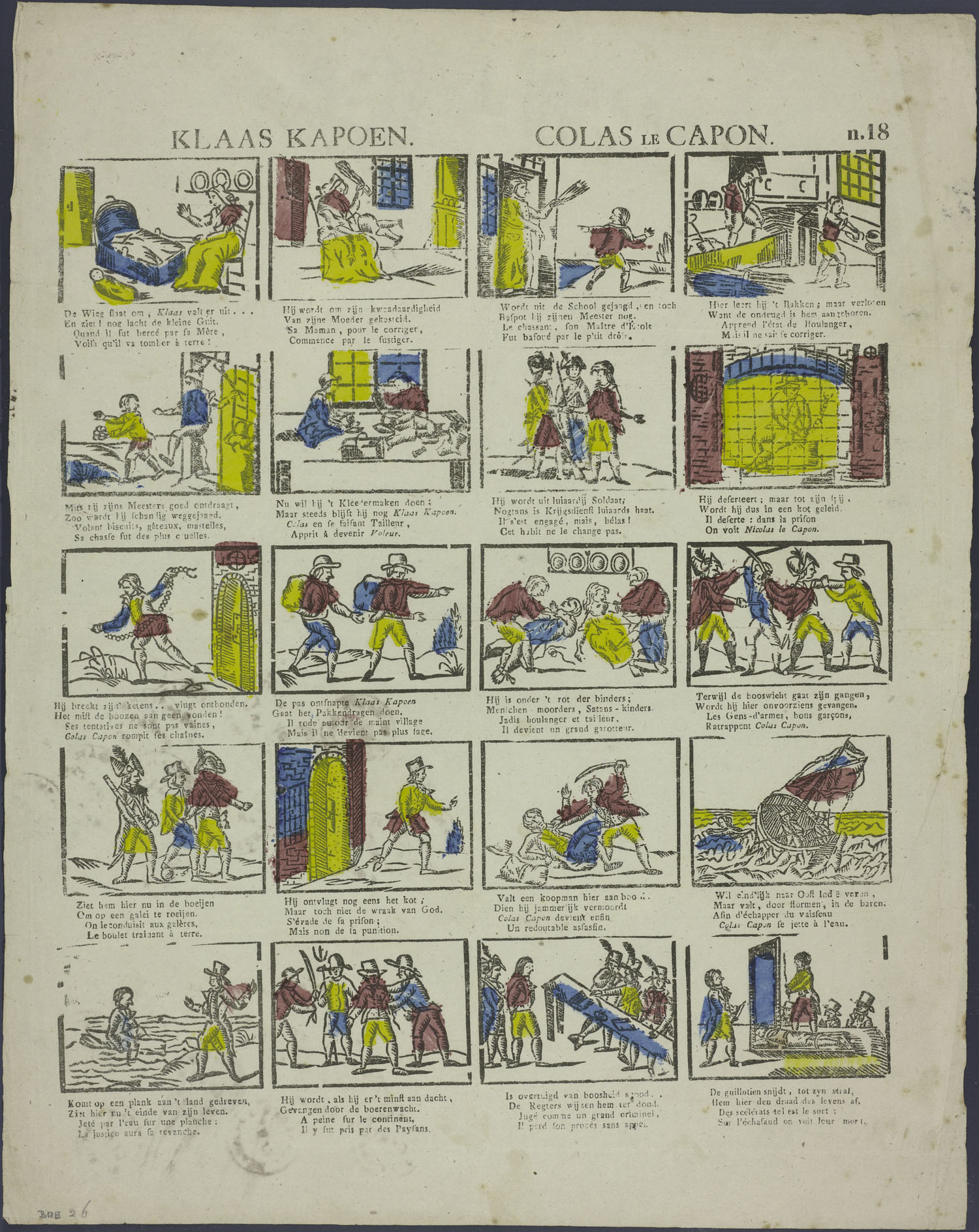 Centsprent met 5 x 4 omkaderde houtsneden, met afbeeldingen uit het leven van een schurk die niet wil deugen: hij valt uit de wieg, krijgt een pak slaag en wordt uit school gejaagd. Dan gaat hij in de leer bij een bakker en een kleermaker, maar dat wordt niets. Hij wordt soldaat, deserteert en wordt opgesloten. Hij ontsnapt en sluit zich aan bij een bende, wordt gevangen, ontvlucht weer, vermoordt een koopman, lijdt schipbreuk en eindigt tenslotte onder de guillotine. Bevat tweeregelige rijmende onderschriften in Nederlands en Frans.